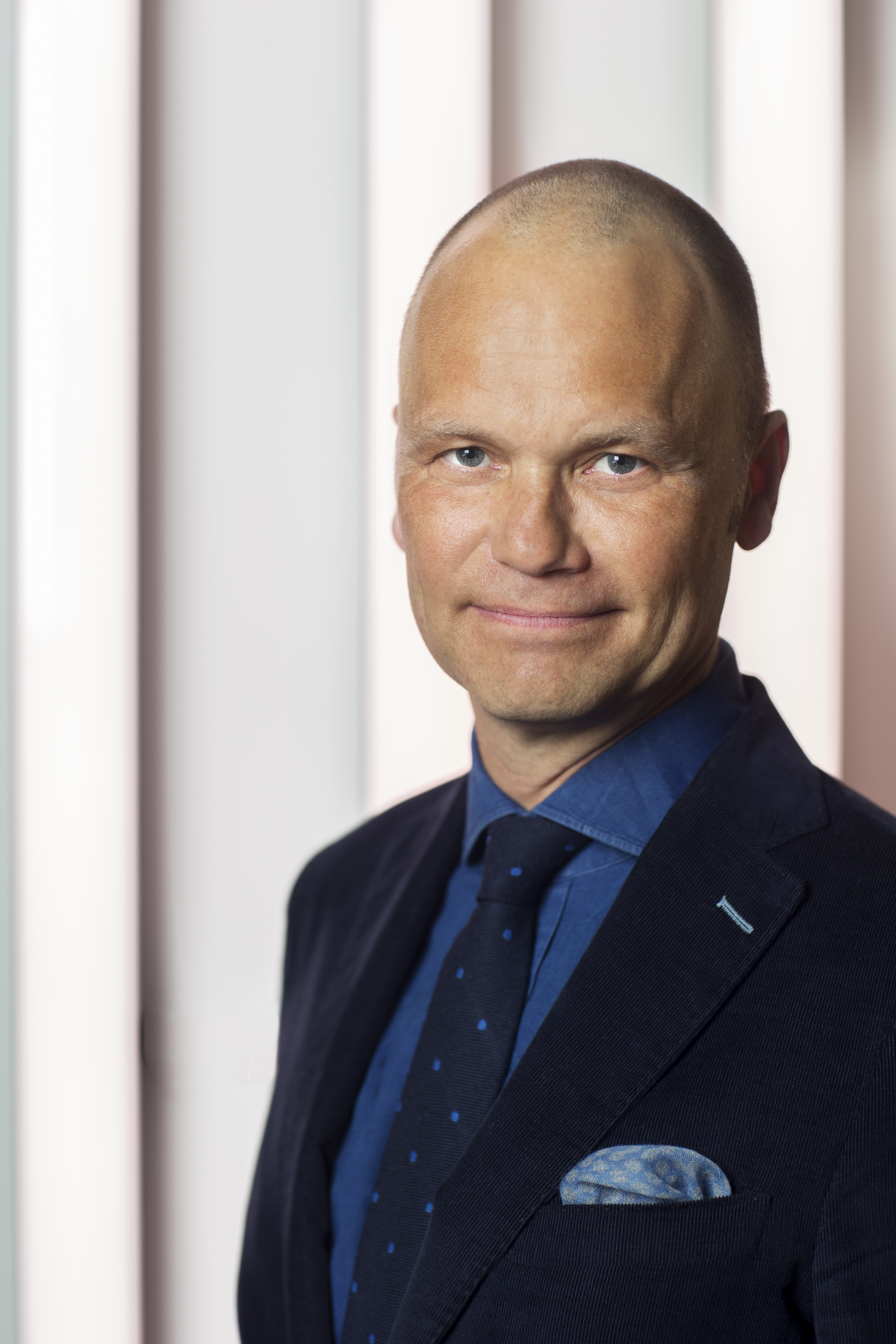 TV4:s VD Casten Almqvist.